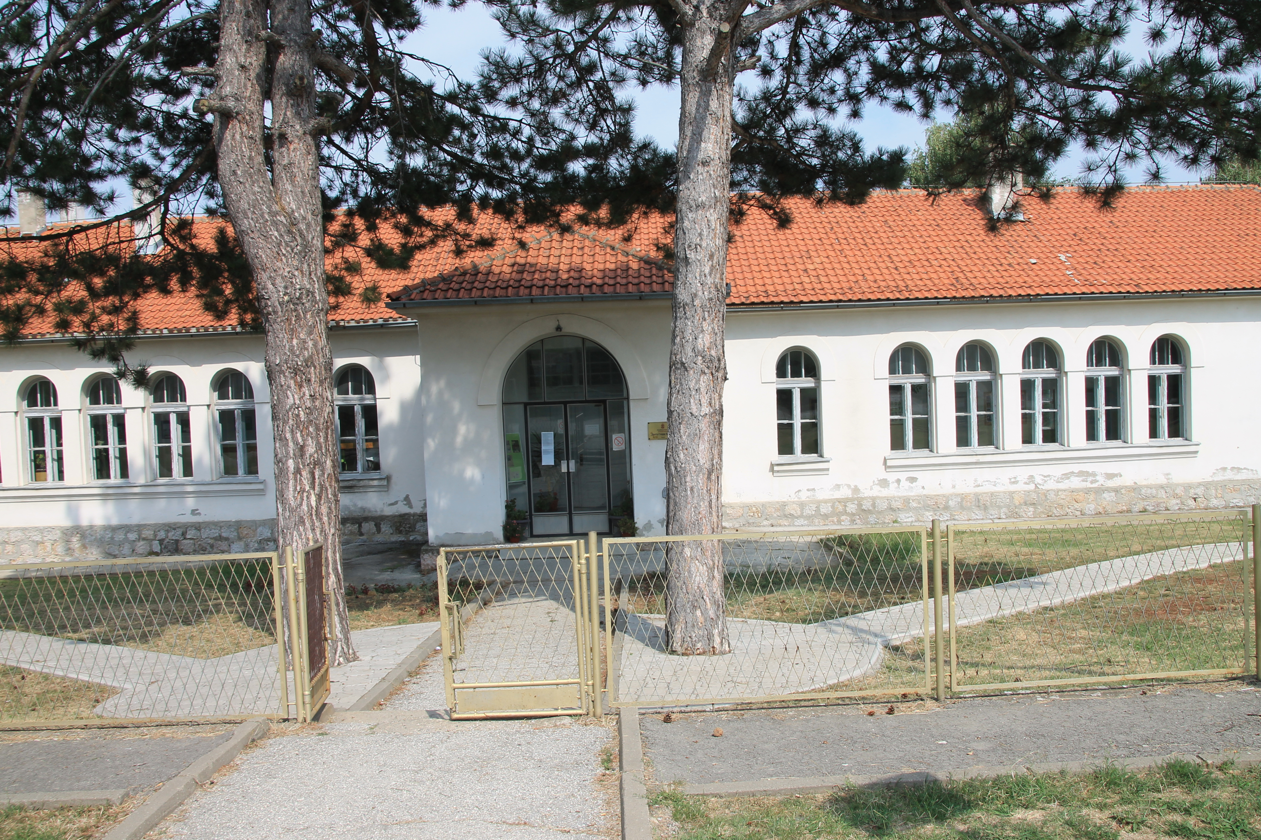 OŠ „Prota Stevan Popović“ Čumić